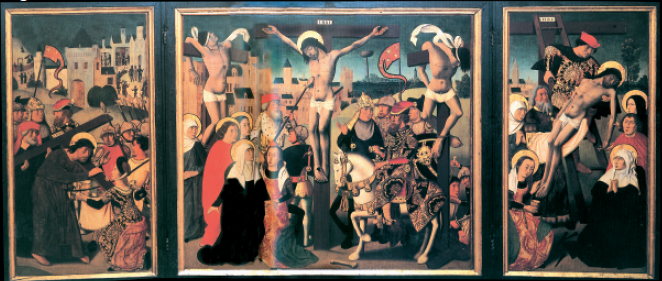 Nekaldiaren triptikoa, Arabako Arte ederretako museoan